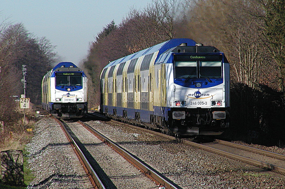 Die neuen Züge in Cadenberge